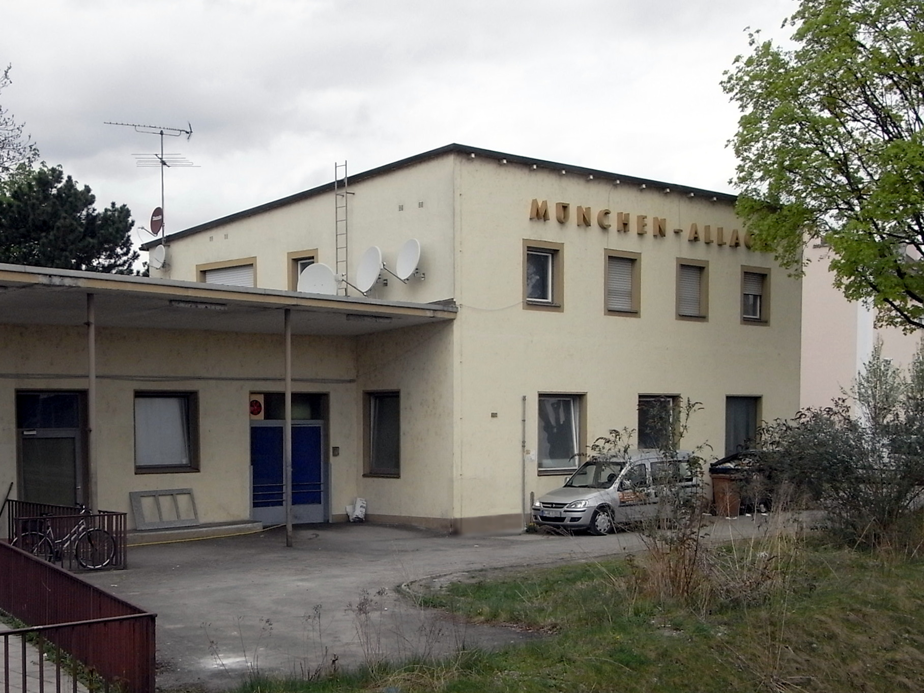 Ehemaliges Bahnhofsgebäude des S-Bahnhofs München-Allach, von Osten.